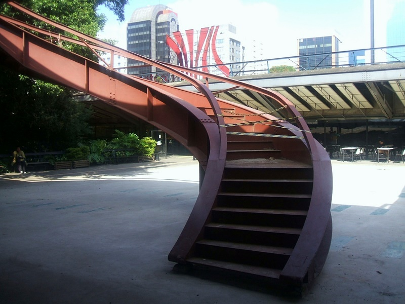 Escadaria de acesso ao jardim suspenso, Centro Cultural São Paulo, distrito da Liberdade, São Paulo, Brasil